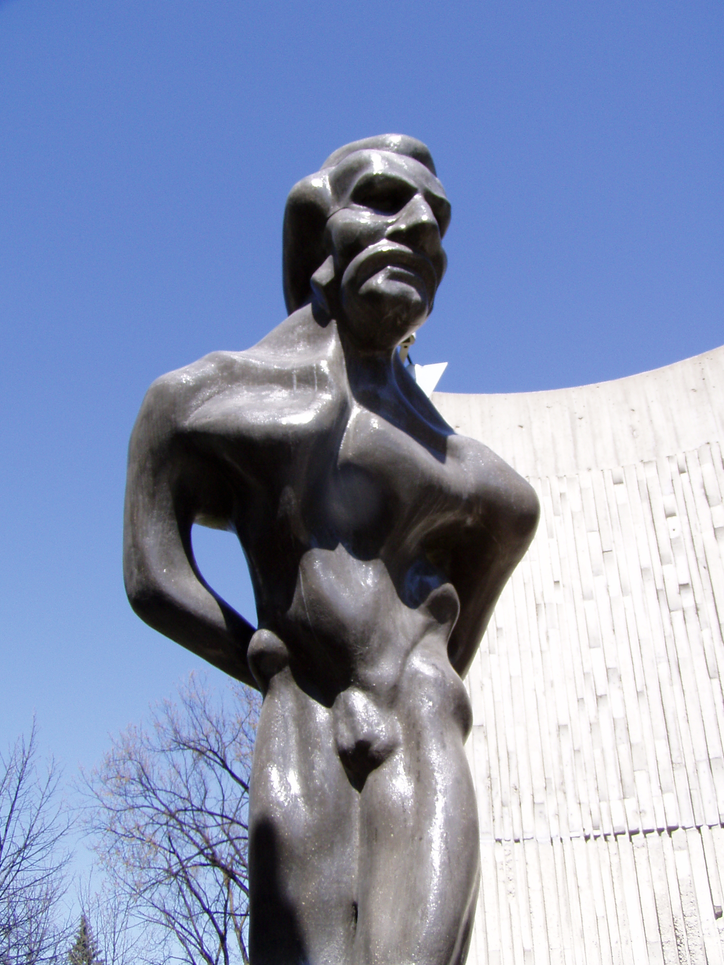 Statue of Louis Riel at Collège universitaire de Saint-Boniface in Winnipeg, May 2, 2005